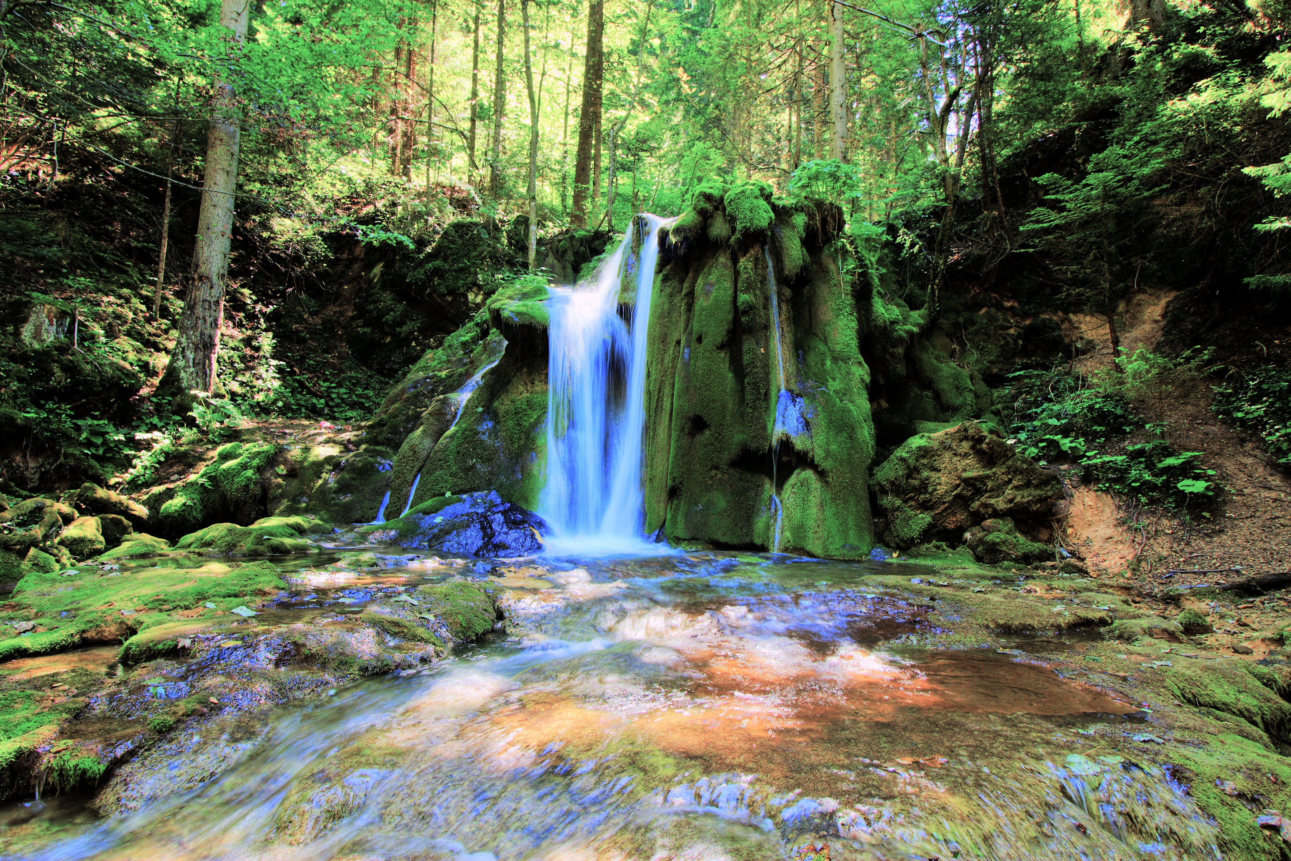 ID је: PZPP015